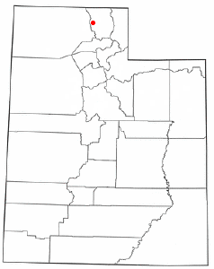 Localización de Mendon, Utah